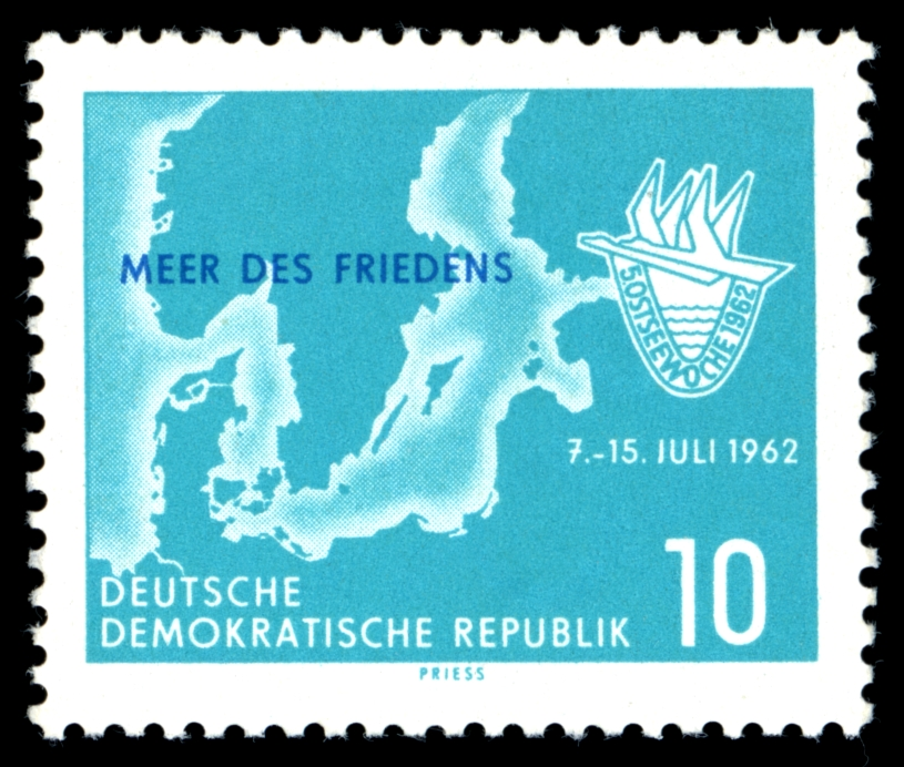 Information Information: Ausgabepreis: Pfennig First Day of Issue / Erstausgabetag: Auflage: Entwurf: Druckverfahren: Michel-Katalog-Nr: Ländercode-MiNr